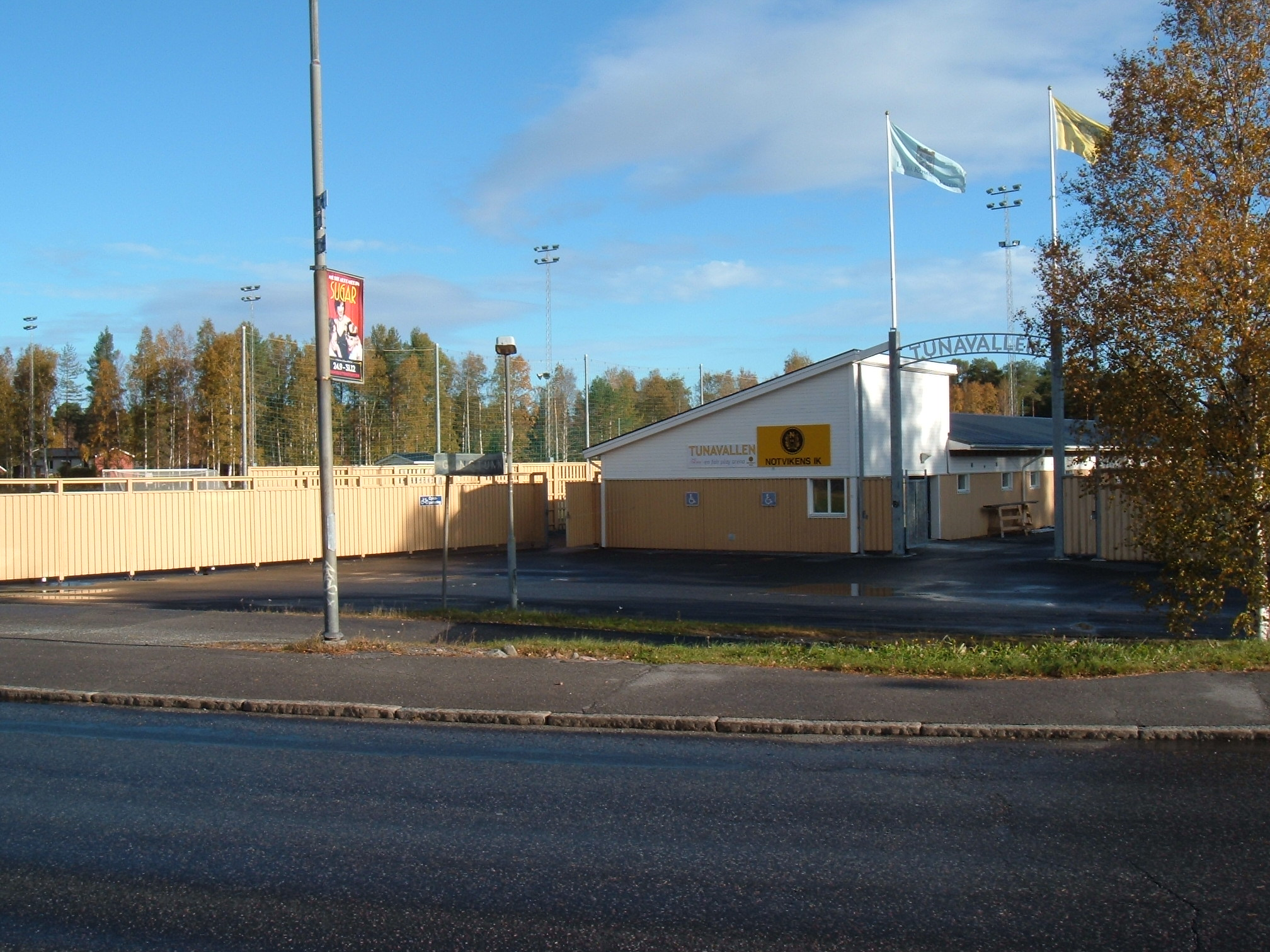 Tunavallen, Luleå